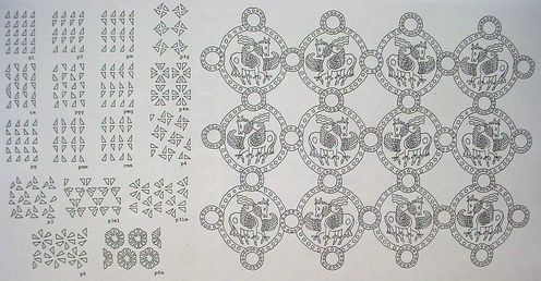 Síkbeli szimmetriaminták a közép-ázsiai művészetben